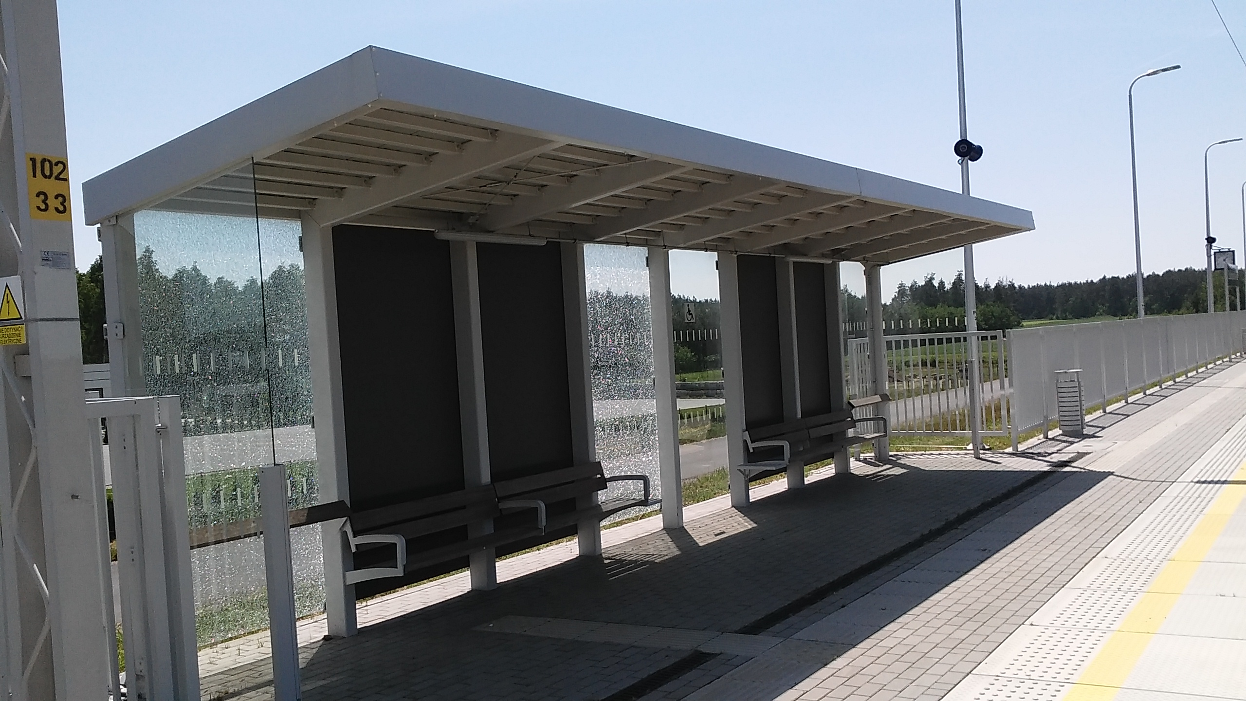 przystanek kolejowy Szulborze Wielkie - zdewastowana wiata przystankowa przy peronie 1 (w kierunku Białegostoku)